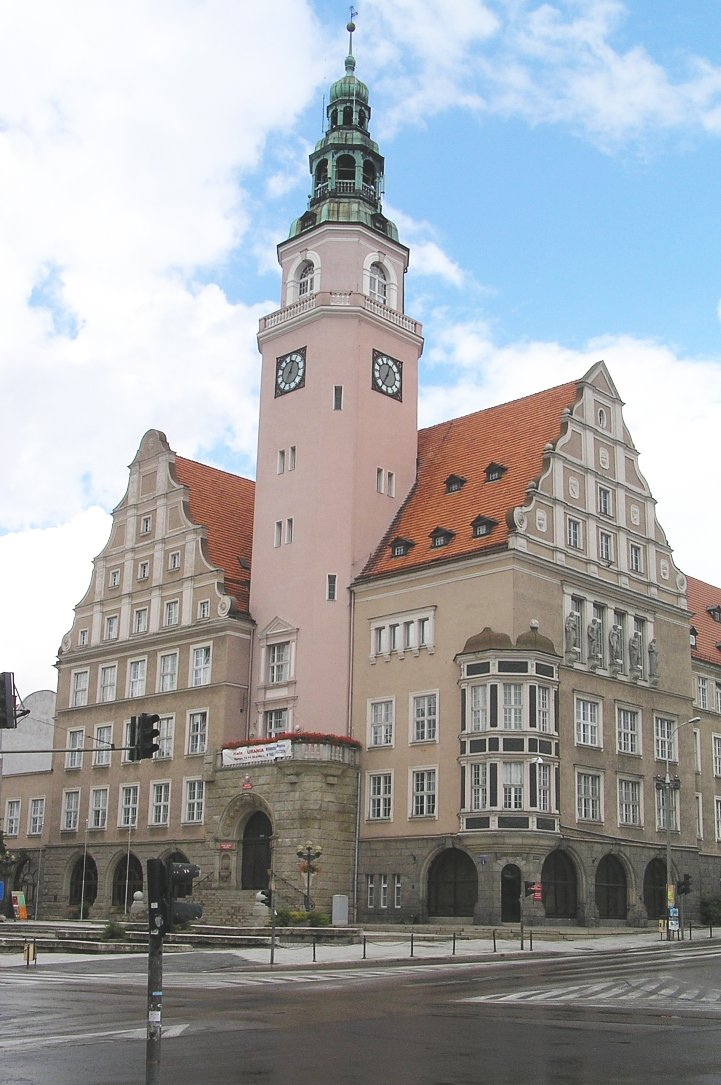 Olsztyn - Nowy Ratusz